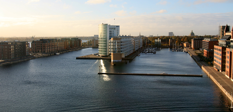 Søndre Frihavn, Copenhagen.